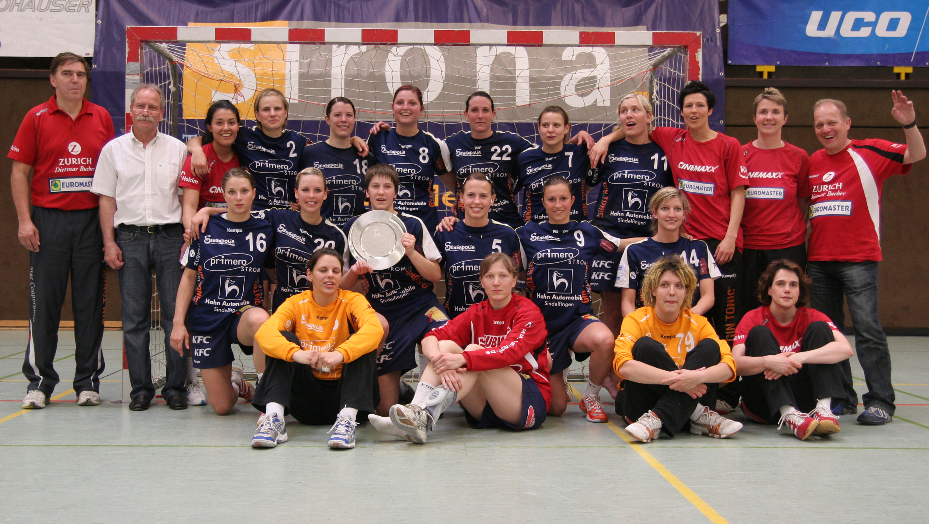 Die Mannschaft des VfL Sindelfingen, Meister der 2. Handball-Bundesliga der Saison 2008/2009. Mannschaftsfoto mit Meisterschale nach dem Play-Off-Finalspiel am 16. Mai 2009 gegen die HSG Bensheim/Auerbach in der Bensheimer Weststadthalle.